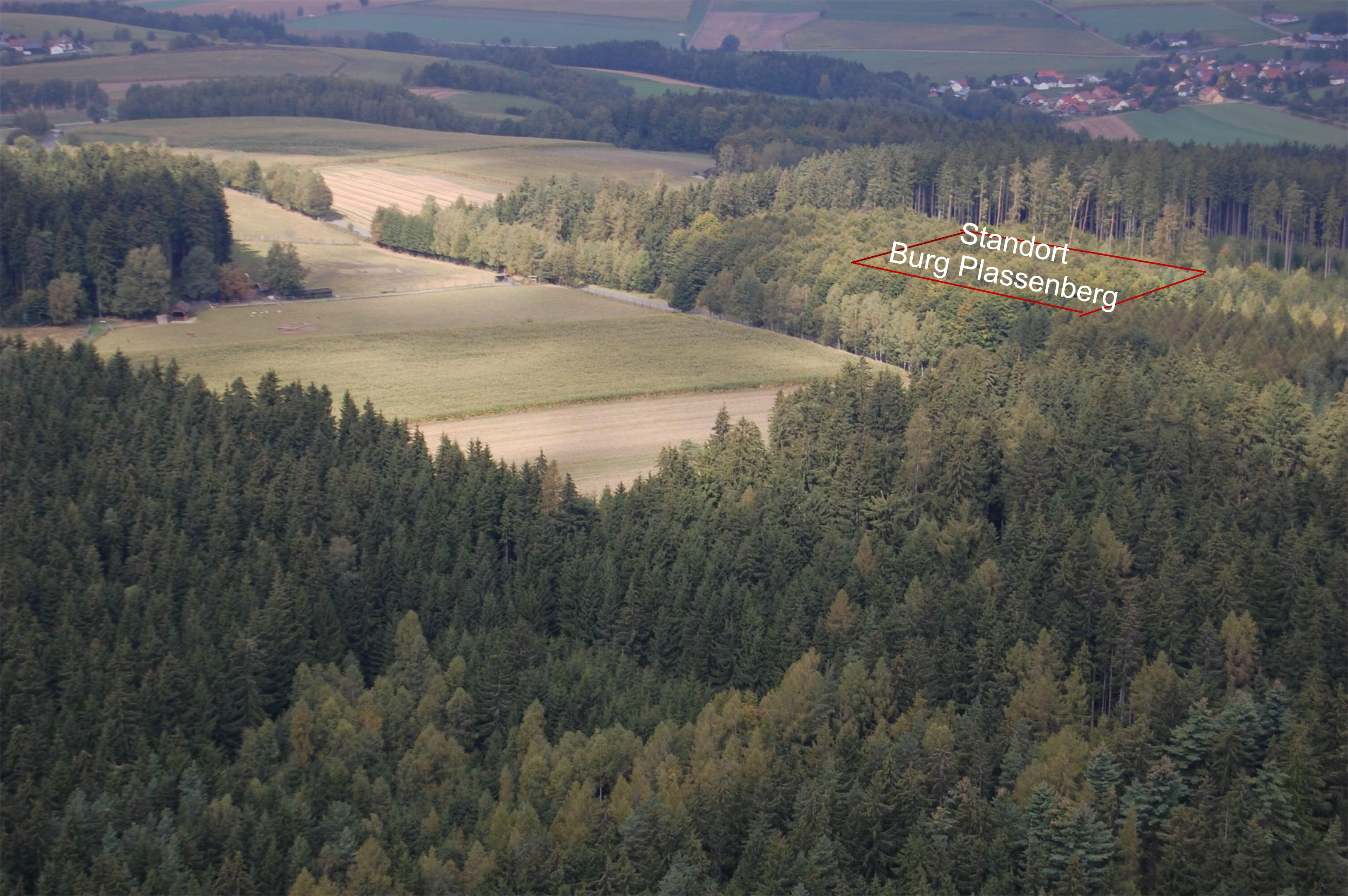 Gleiritsch, Burgstall Gleiritsch, Standort der Burg Plassenberg (2010) mit Sicht auf die Burgen Leuchtenberg, Tännesberg, Wildstein und Obermurach